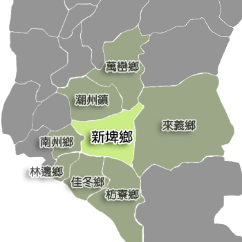 屏東縣新埤鄉相對位置。